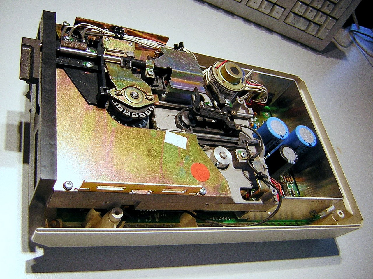 Atari 1050 5,25" Diskettenlaufwerk geöffnet Laufwerksmechanik